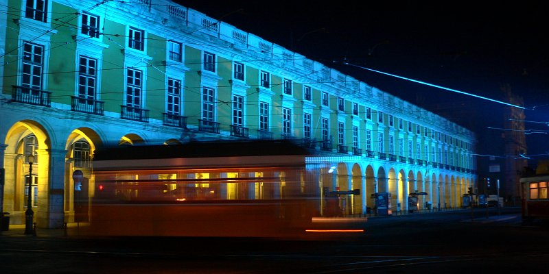 A night scene in central Lisbon, a tram rushes past on Praça do Comĕrcio.